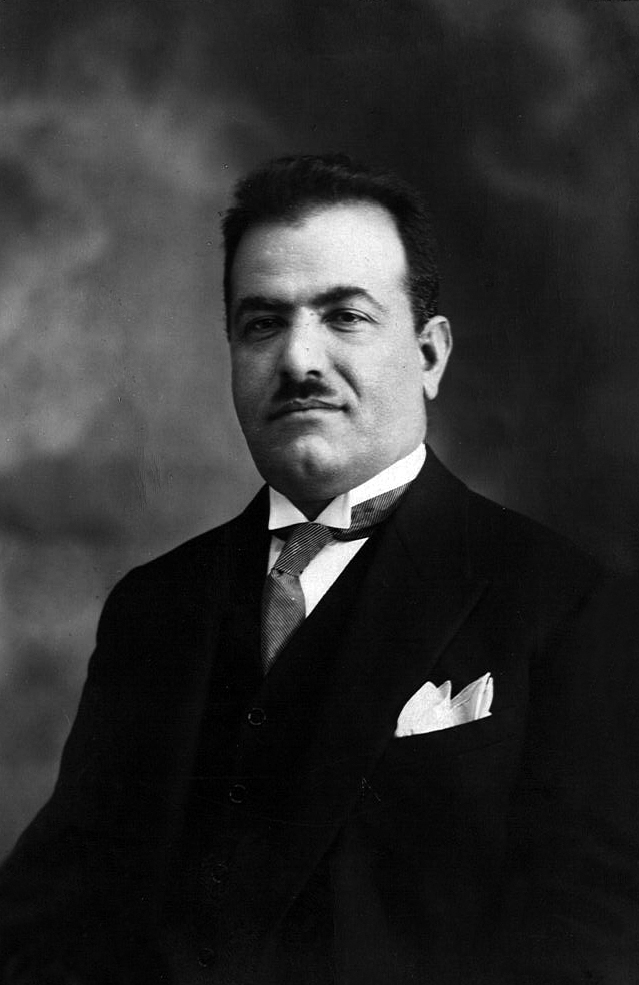 Hayrettin Belli'nin 1920'li yıllardaki portresi